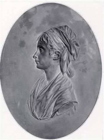 Medallion after a design by Pajou fils.